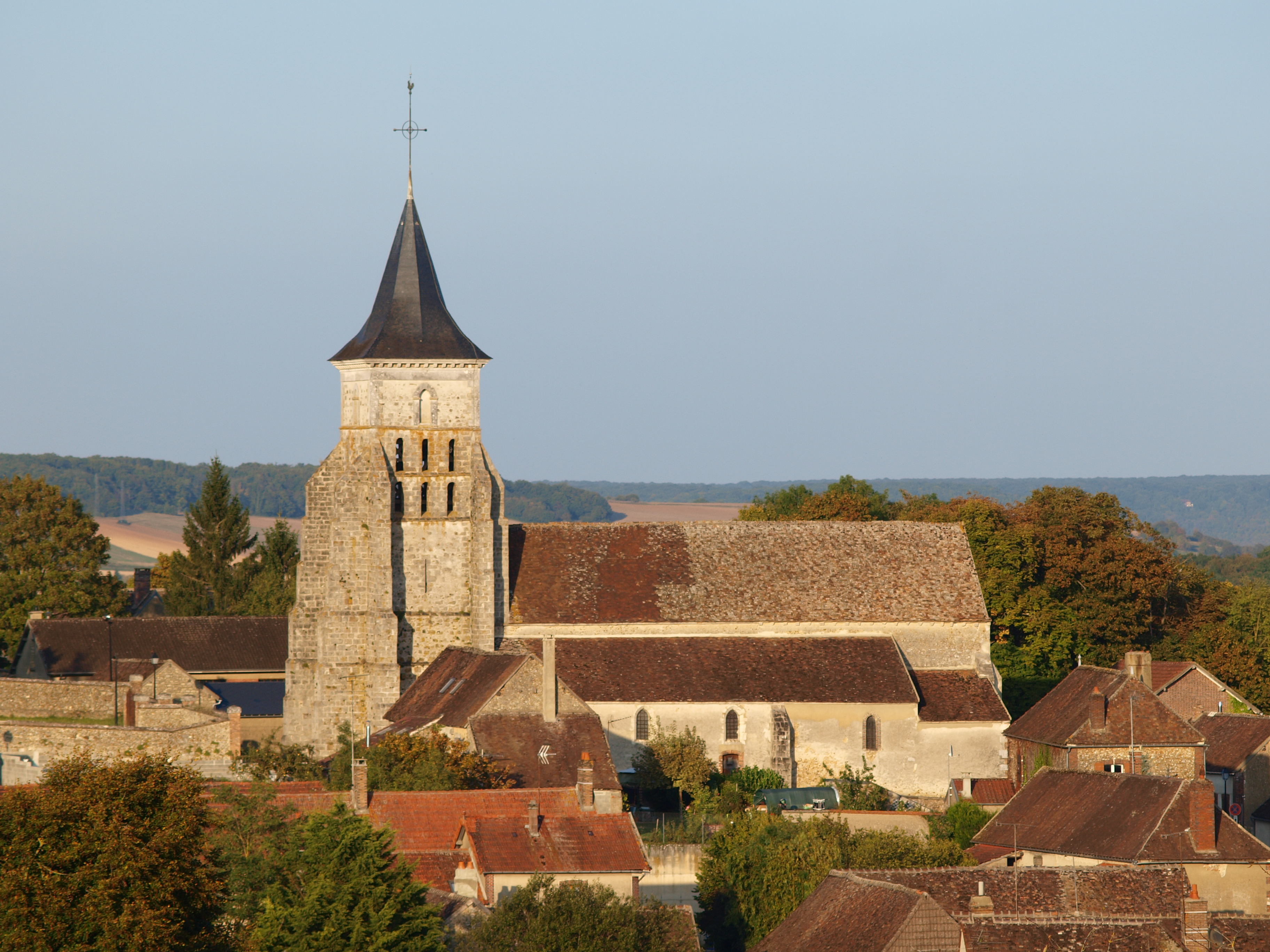 Église Saint-Léon de Précy-sur-Vrin (Yonne, France)